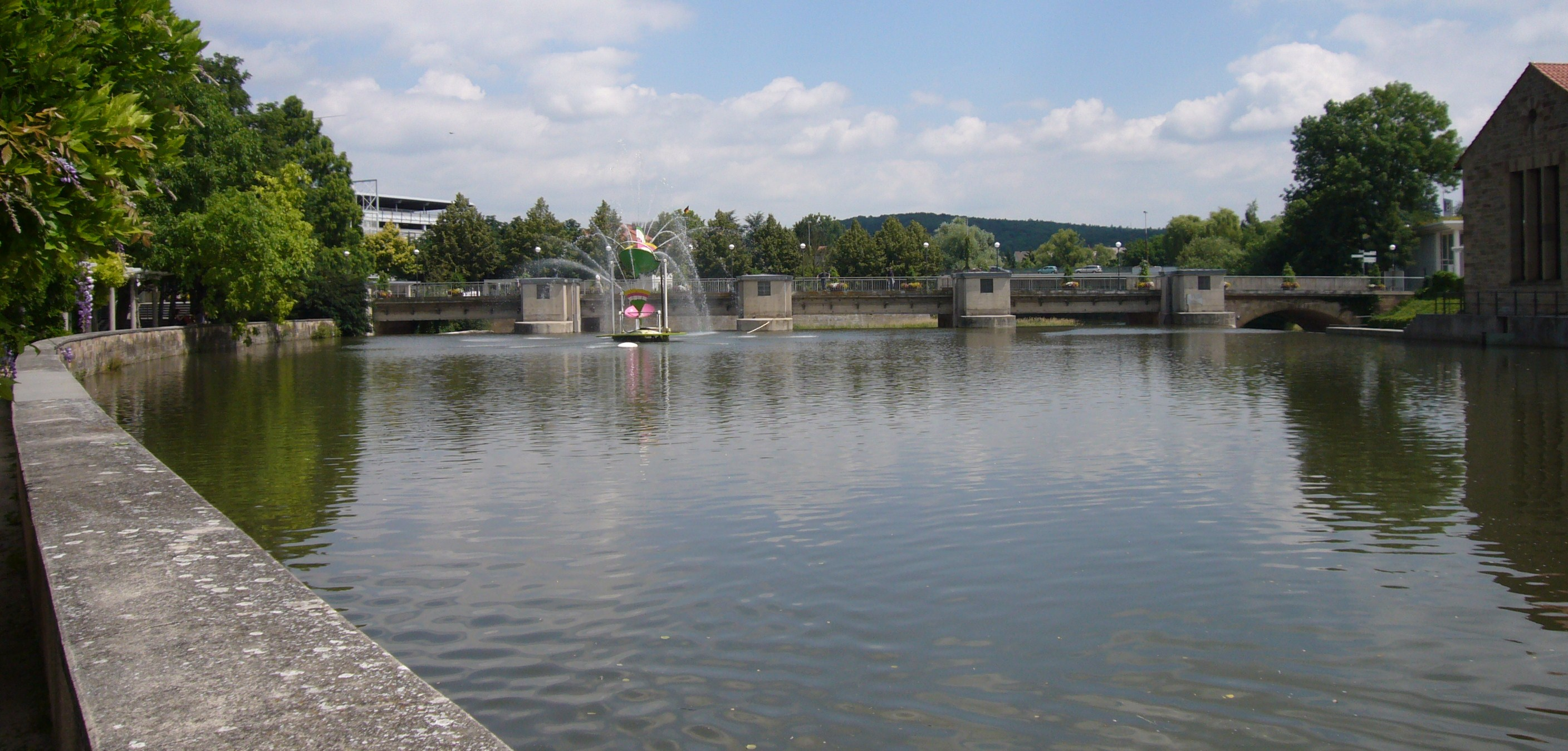 Die Enz unmittelbar vor dem Zusammenfluss mit der Metter in Bietigheim-Bissingen